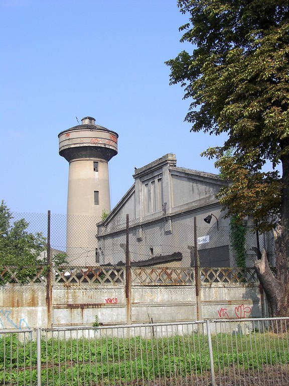 Fabryka Pafino przy ul. Dąbrowskiego 17/21 w Łodzi